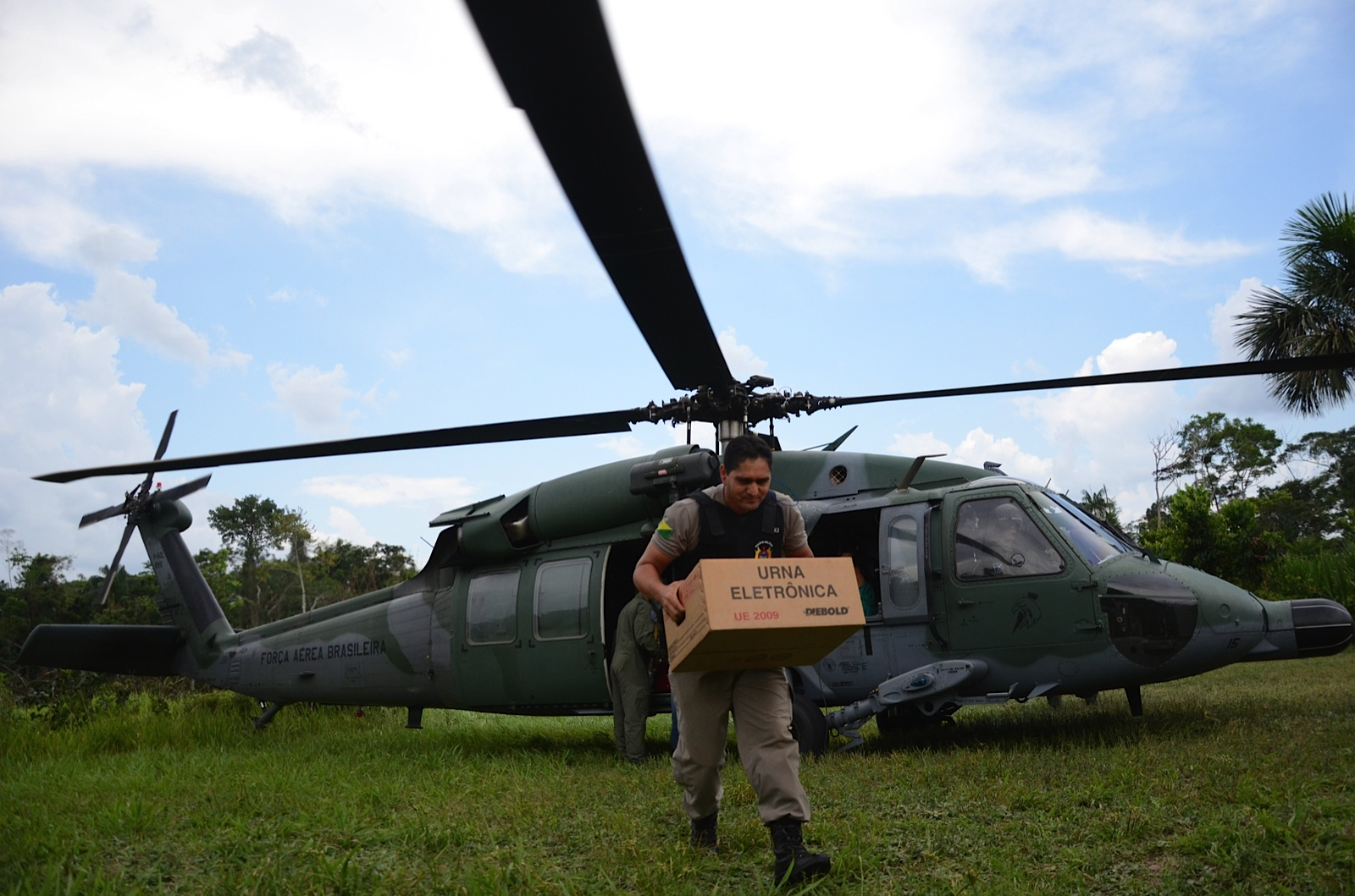 03/10/2014, Três Bocas - AC Fotos: João Evangelista (FAB)